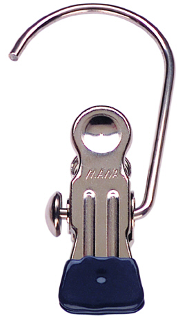 MAWA Clip K1 (Nutzung zum Aufhängen von Accessoires, Schuhen oder auch im Bürobereich